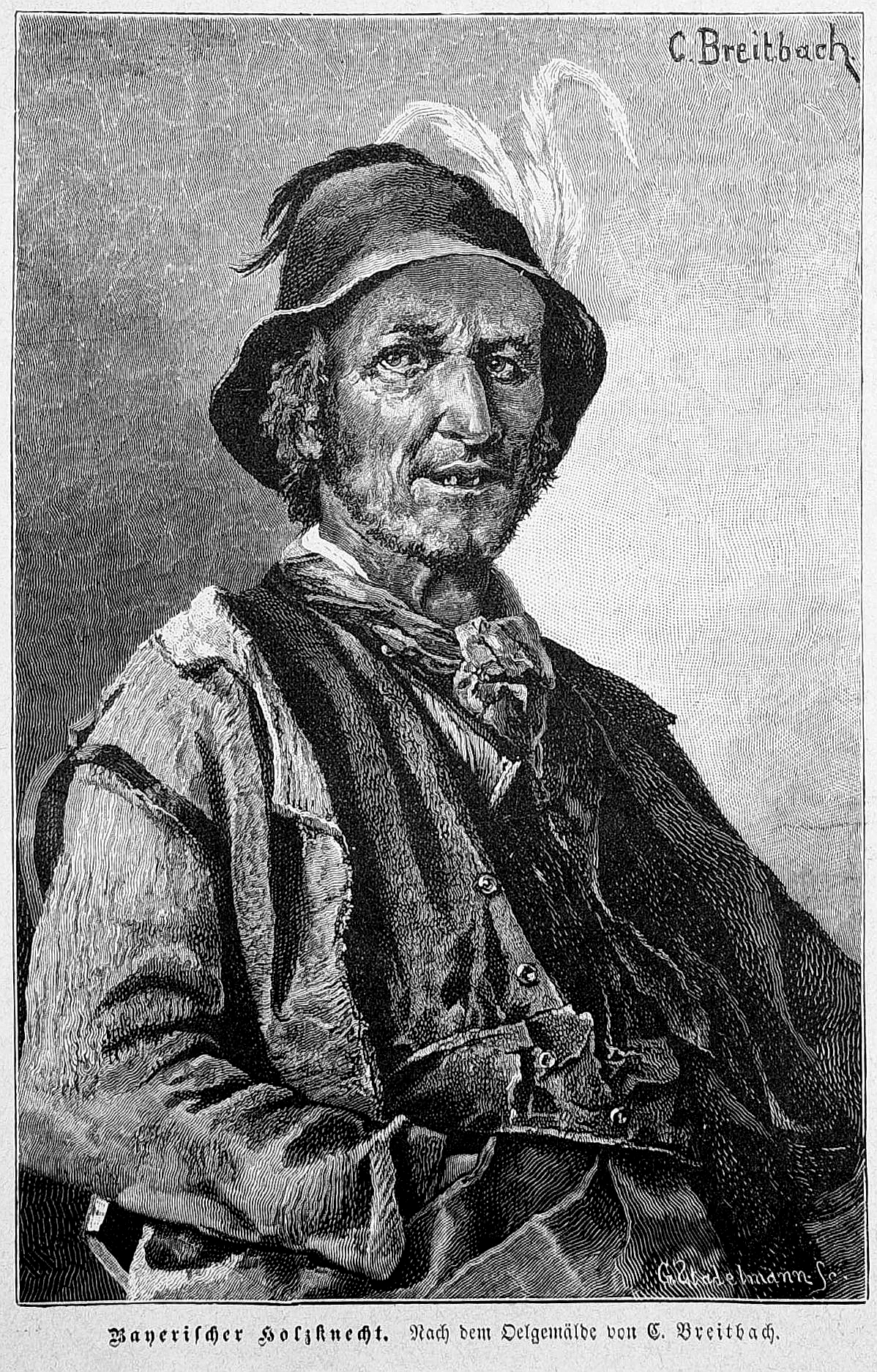 Bild aus Seite 257 in "Die Gartenlaube". Image from page 257 of journal Die Gartenlaube, 1887.